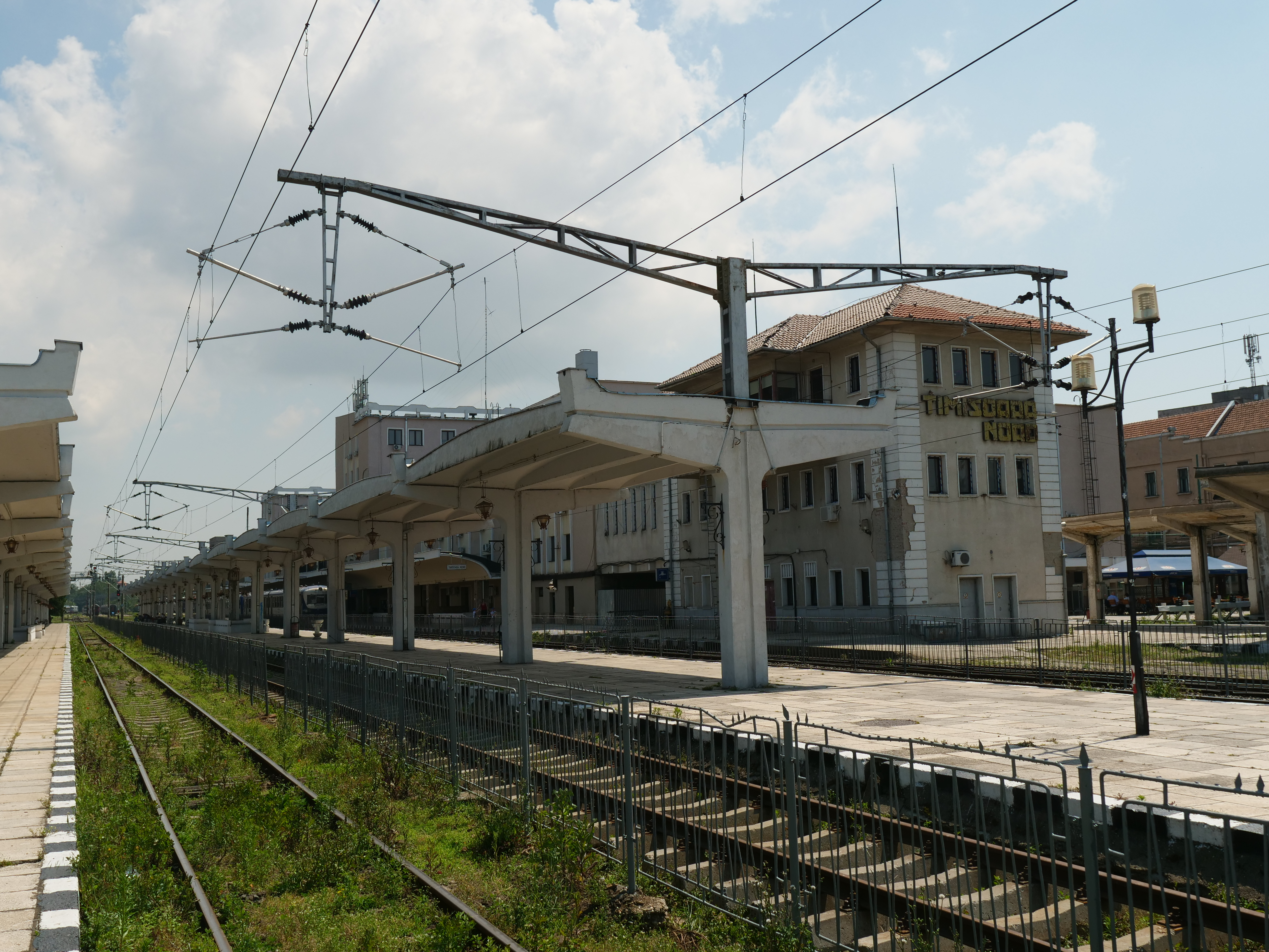 Gara de Nord din Timisaora, vazuta din zona peroanelor intr-o zi de vara in anul 2019